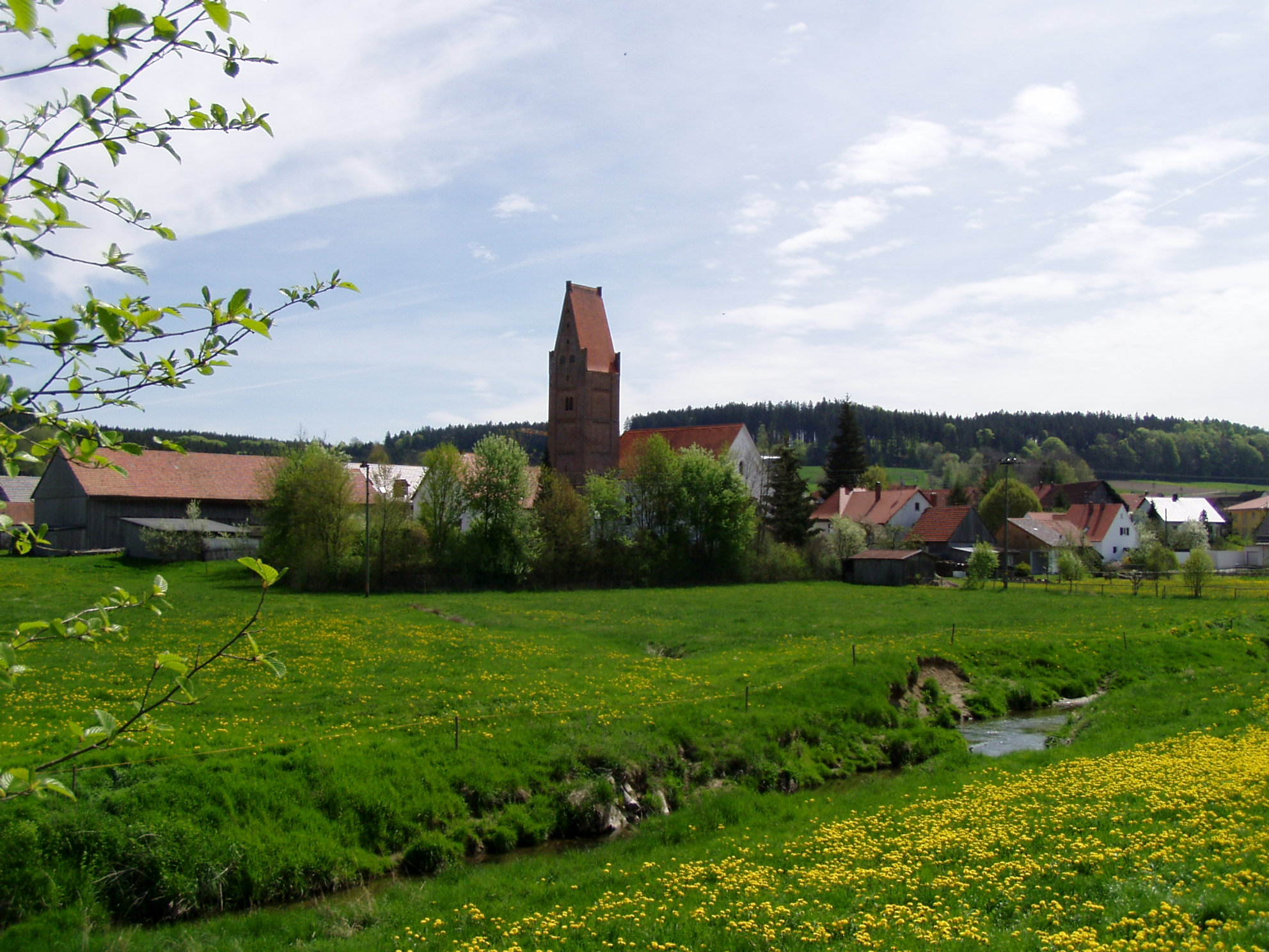 Willmatshofen, Fischach